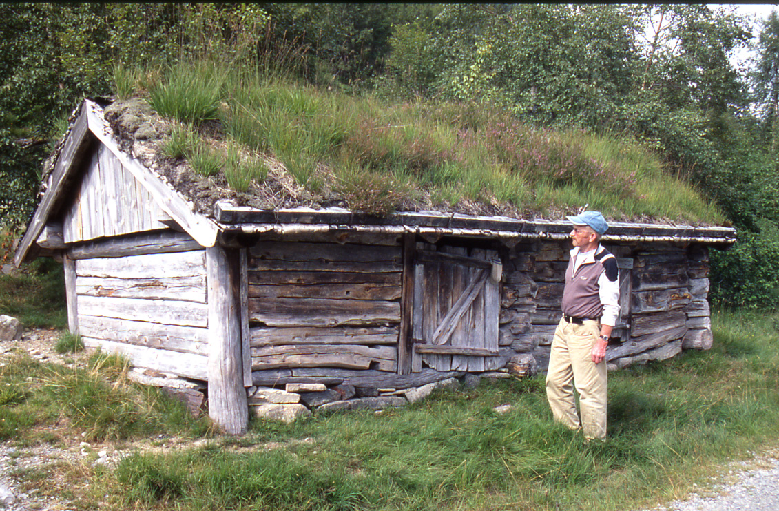 Stølsbua i Slettedalen.